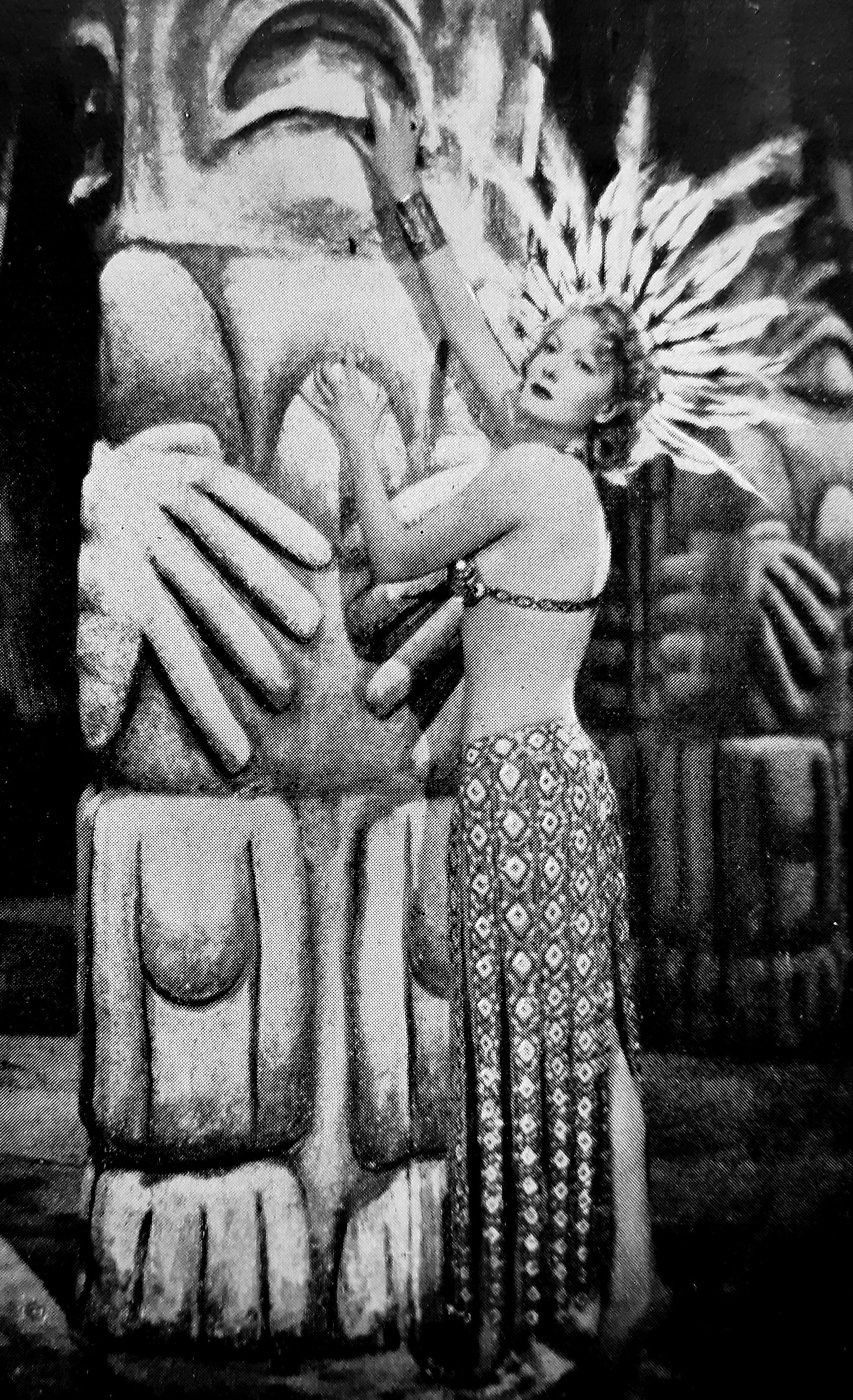 senza cielo reg Guarini prod. Continentalcine Roma 1940